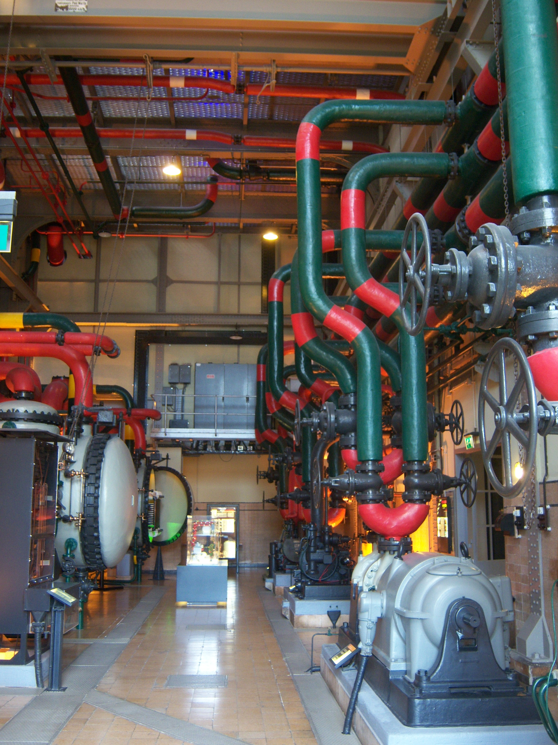 Vista da Sala de Águas do Museu da Electricidade